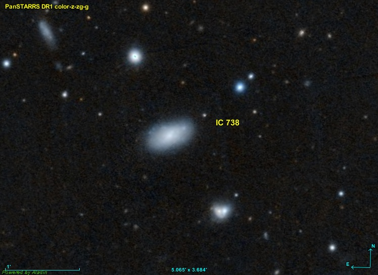 Réalisez avec Alandin et les données PanSTARRS